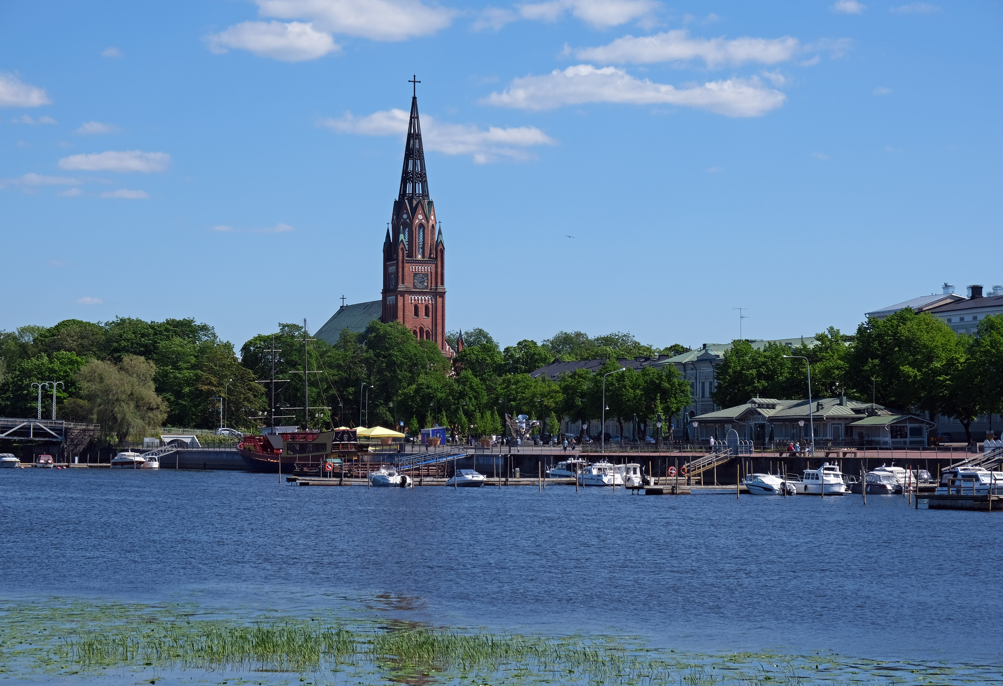 Keski-Porin kirkko Kirjurinluodon kärjestä nähtynä.